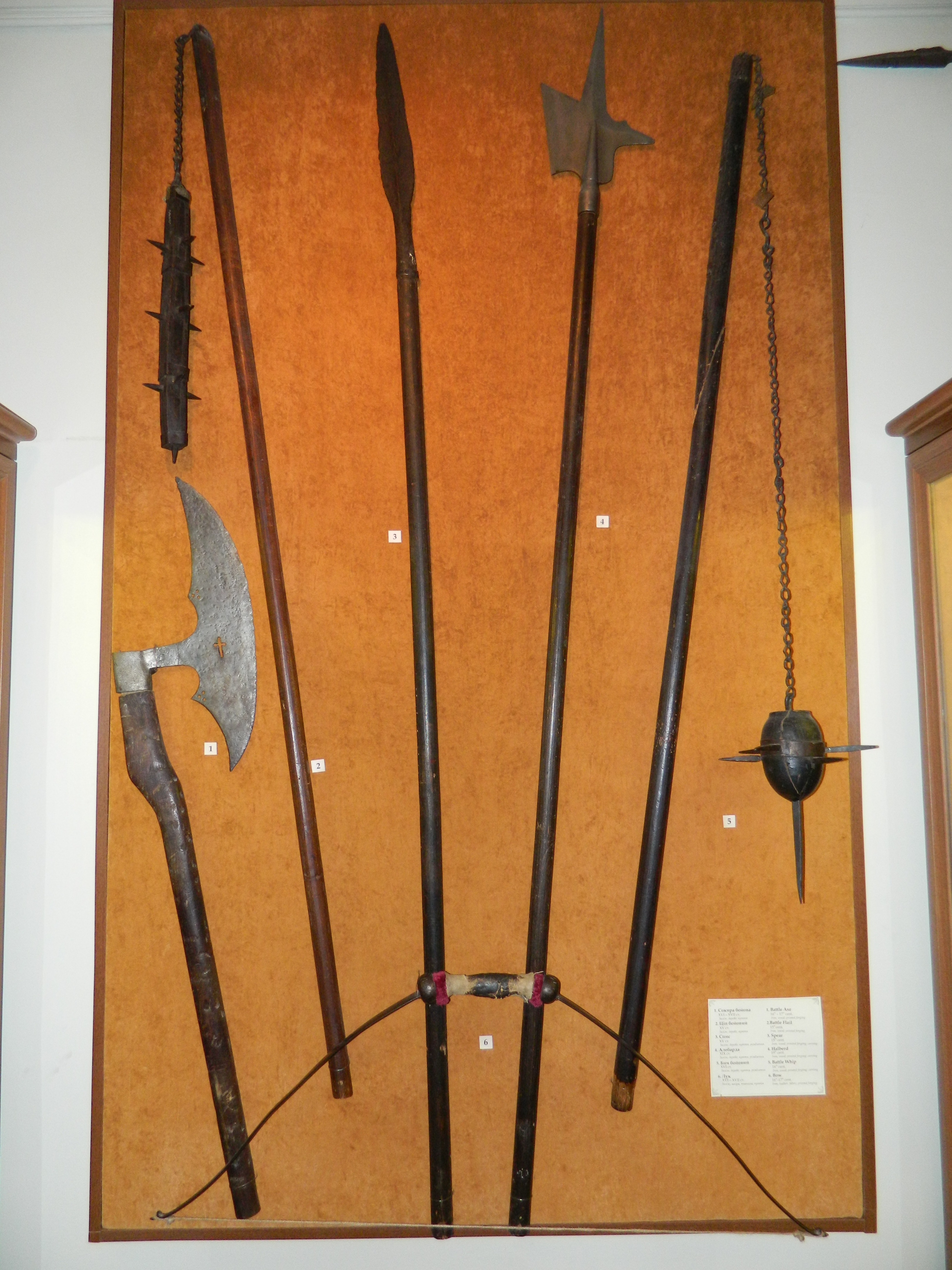 Оружие в Львовском историческом музее